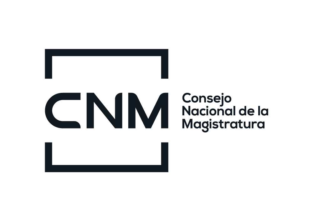 Consejo Nacional de la Magistratura